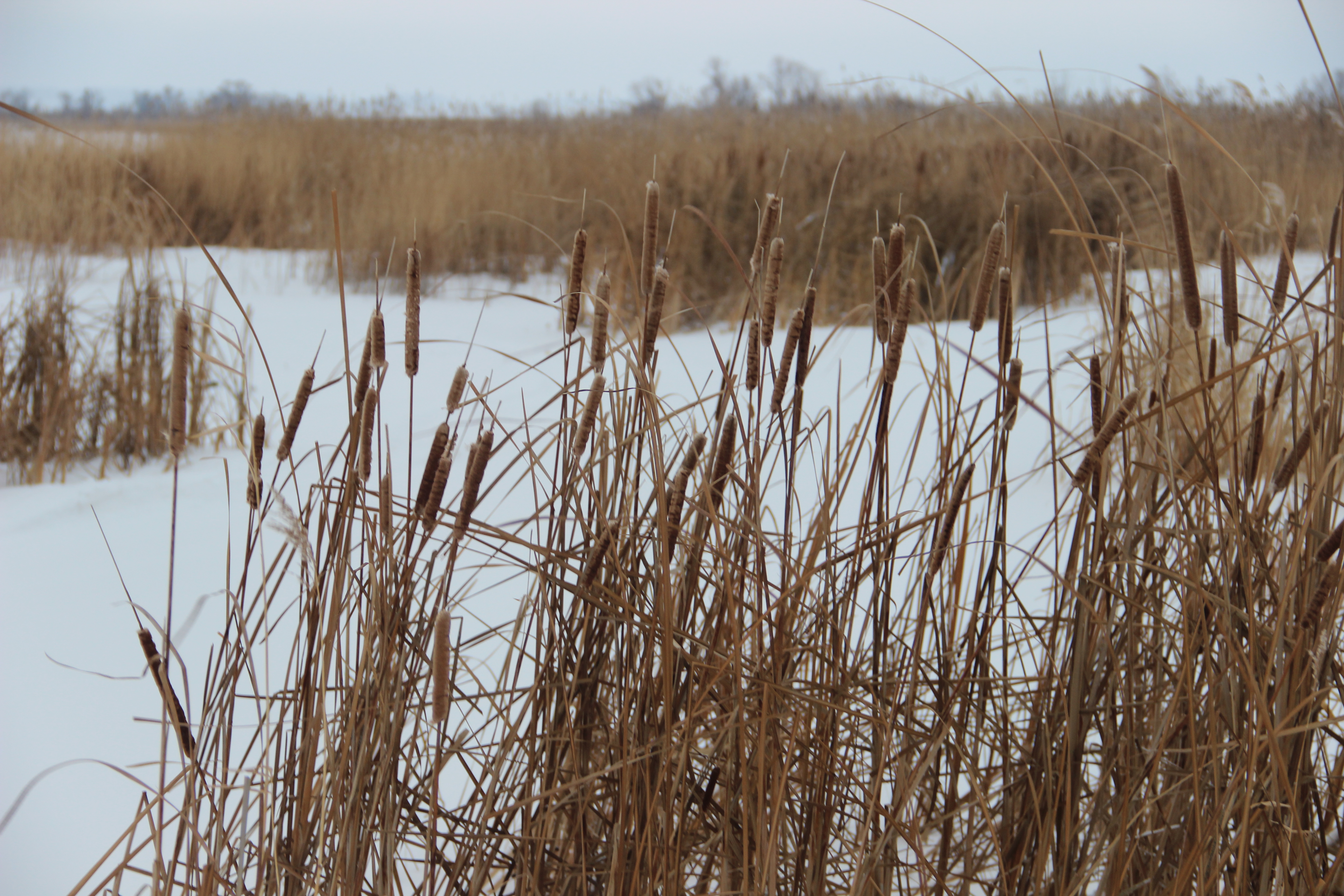 Рогоз около берега. Кама. Саконы. Алексеевский р-н. РТ. Декабрь 2014